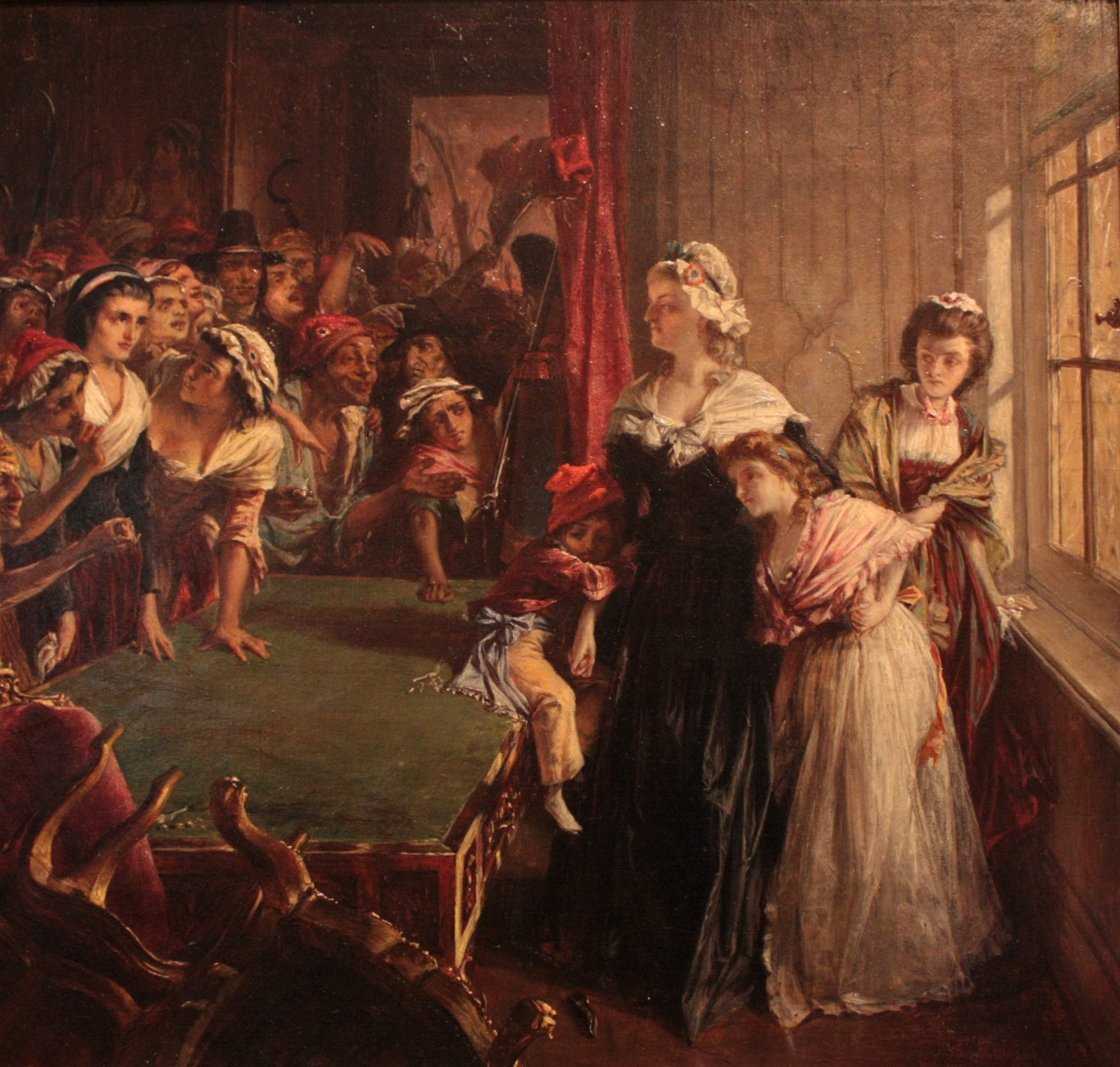 Les Tuileries, 20 juin 1792 par Alfred Elmore, vers 1860